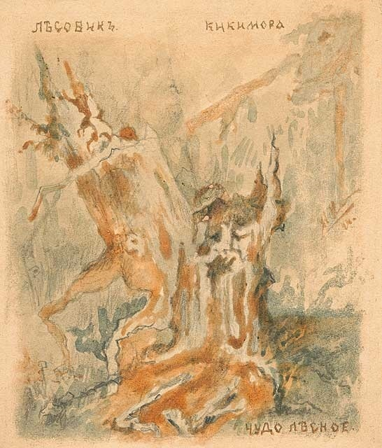 Лесовик. Кикимора. Чудо лесное. 1894. Музей Николая Рериха, США. Нью-Йорк. Материал, размеры: картон, карандаш, акварель. 14,5 х 12.3 см.